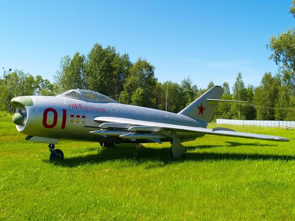 Миг-17 - самолёт который осваивал А. Покрышкин будучи командиром 88-го ИАП в Ржеве